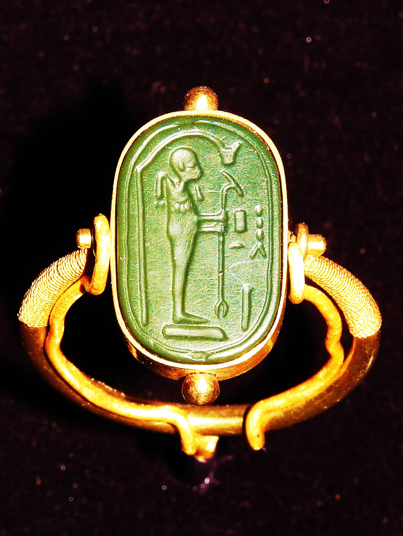 ഈജിപ്ഷ്യൻ മോതിരം- വാൾട്ടേഴ്സ് ആർട്ട് മ്യൂസിയിയത്തിലെ ശേഖരത്തിൽ നിന്നും